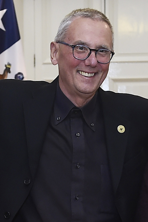 Gobierno de Chile